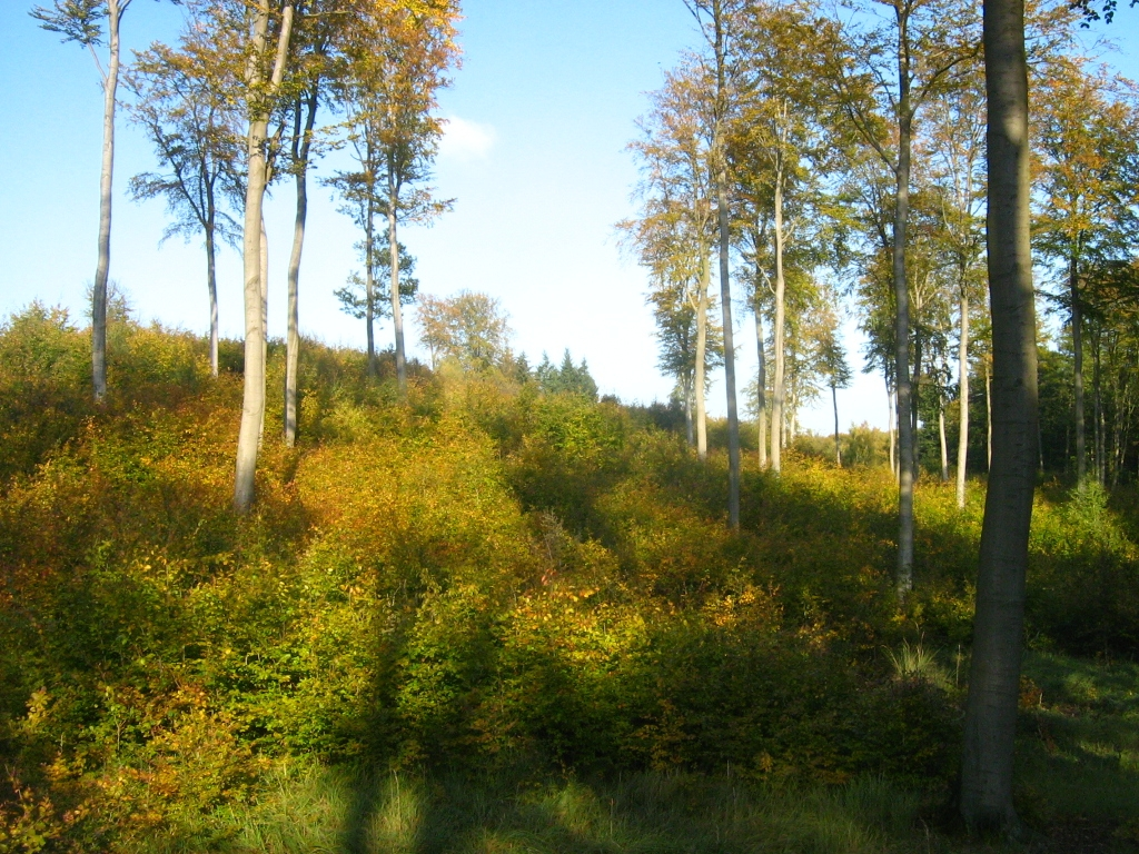 Buchennaturverjüngung in den Bergen bei Rothemühl (Landkreis Uecker-Randow, Vorpommern).